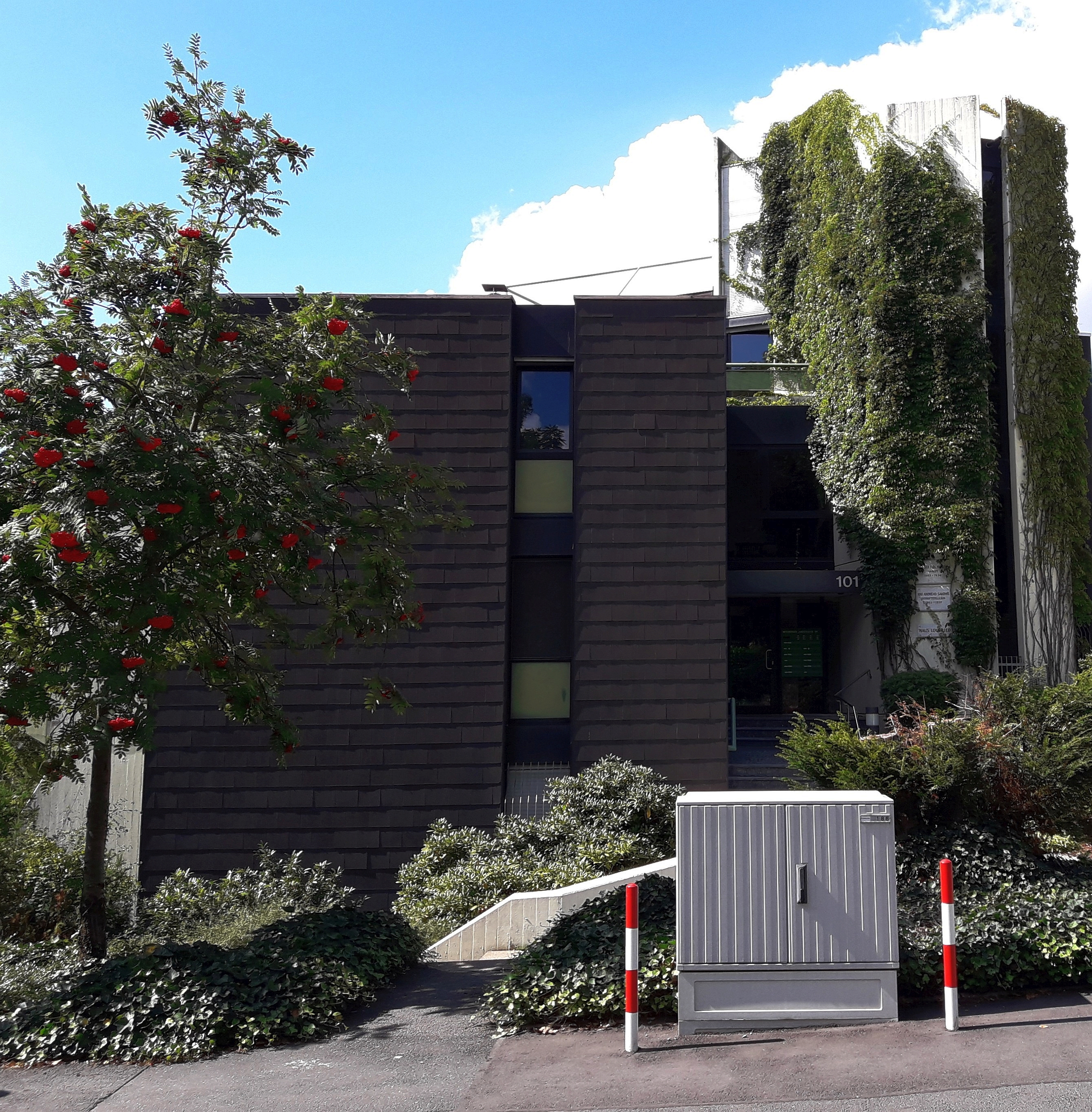 Göttingen (Herzberger Landstraße 101, 37085 Göttingen): Neubau anstelle des ehemals an dieser Stelle stehenden und von Lou Andreas-Salomé bewohnten Hauses "Loufried"